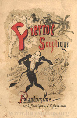 Poster for the pantomime "Pierrot sceptique" (1881) by Léon Hennique (1851-1935) and Joris-Karl Huysmans (1848-1907)